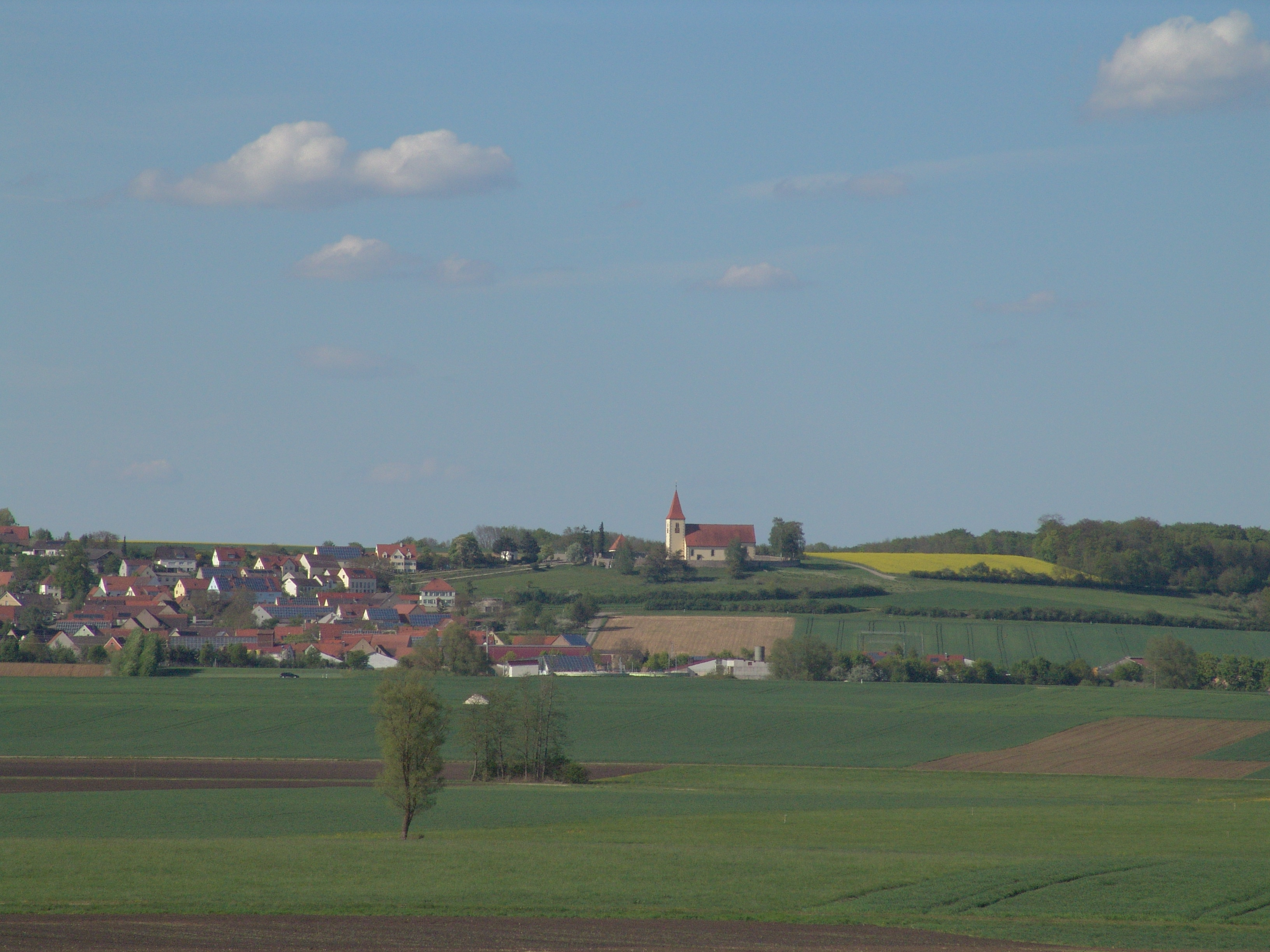 Ehingen am Ries von Süden aus gesehen